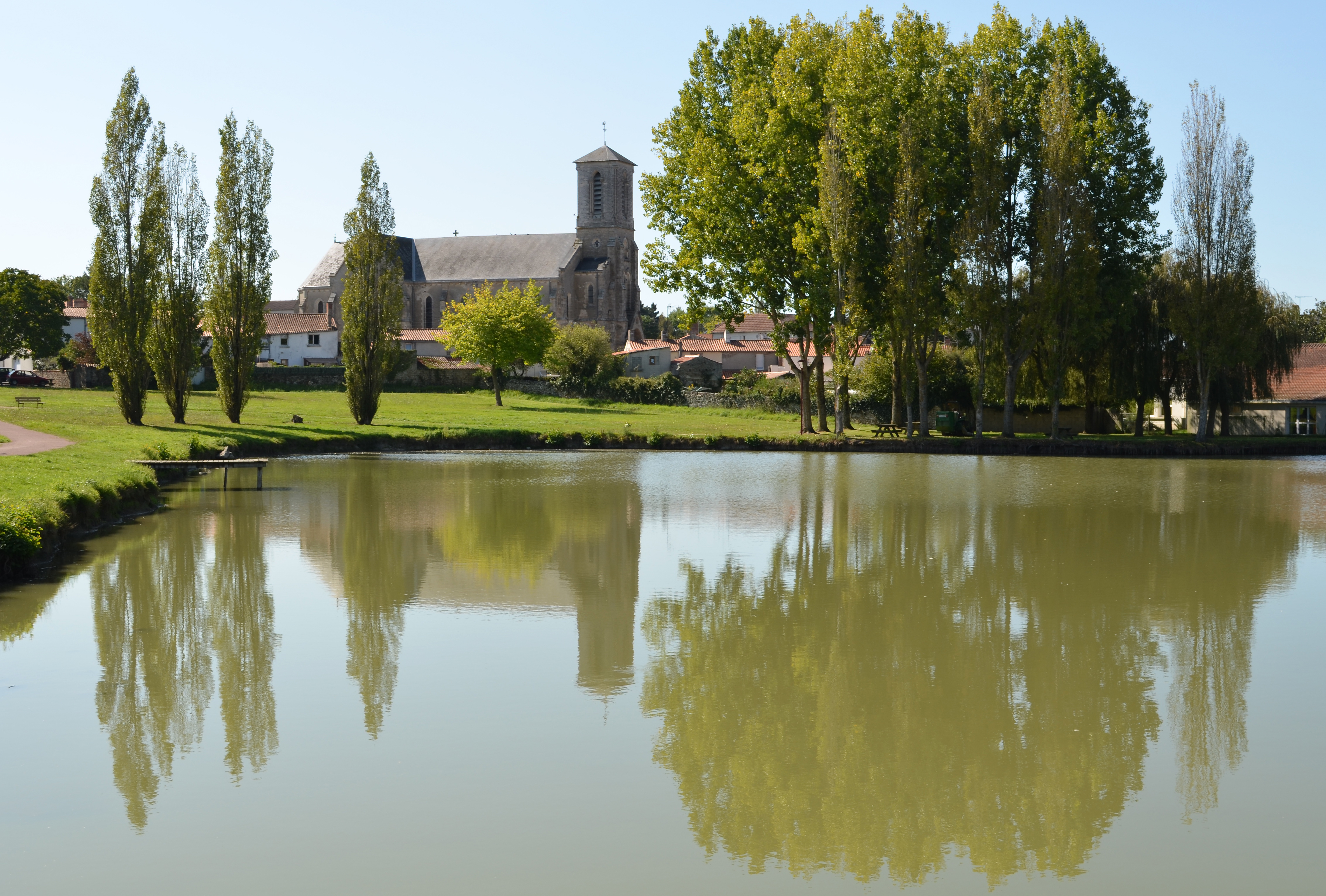 Eglise Saint-Gilles et le plan d'eau de Palluau (Vendée)